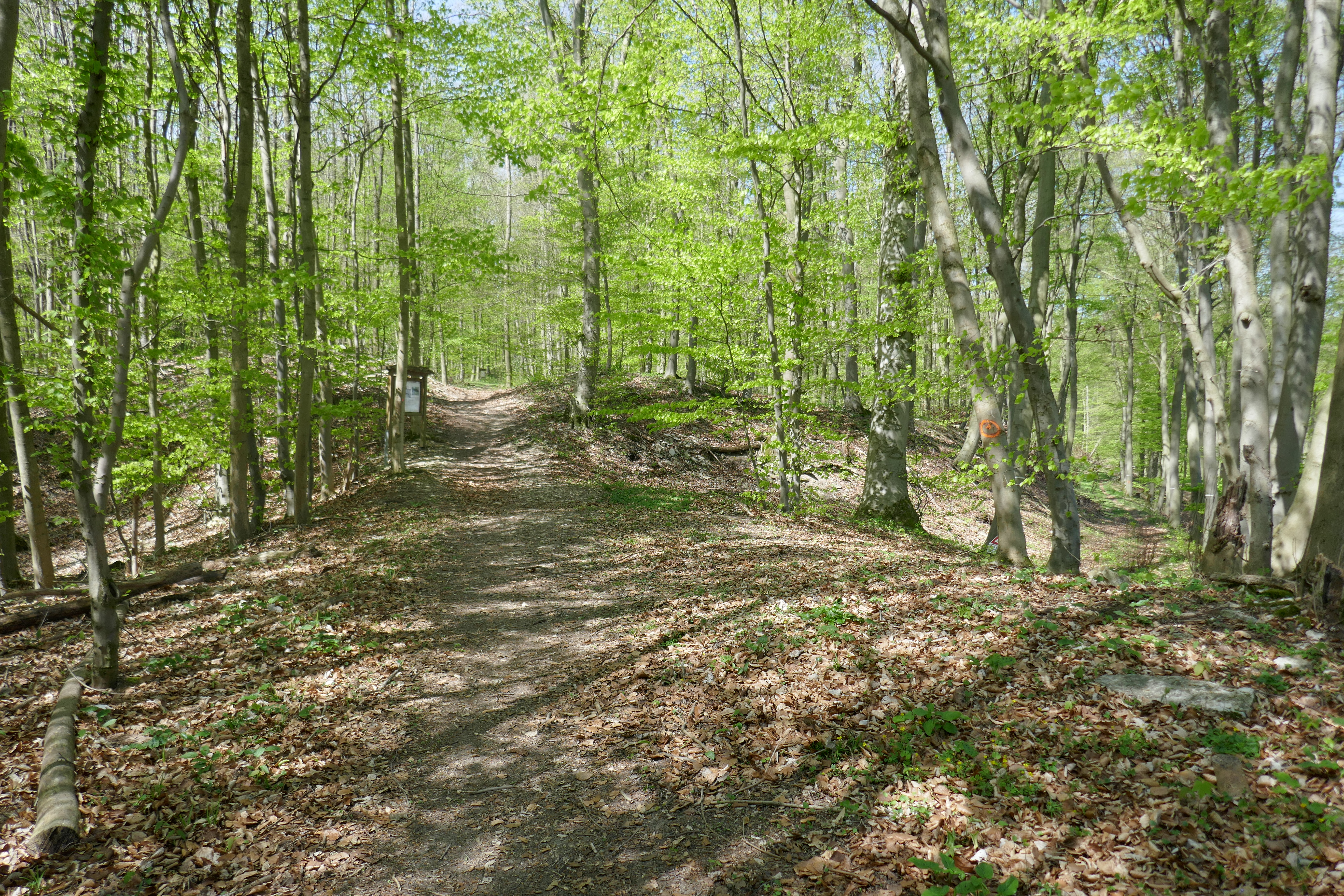 Wallburg Gellinghausen im Ritterholz (LSG Altenautal-Nonnenbusch) zwischen Borchen und Etteln